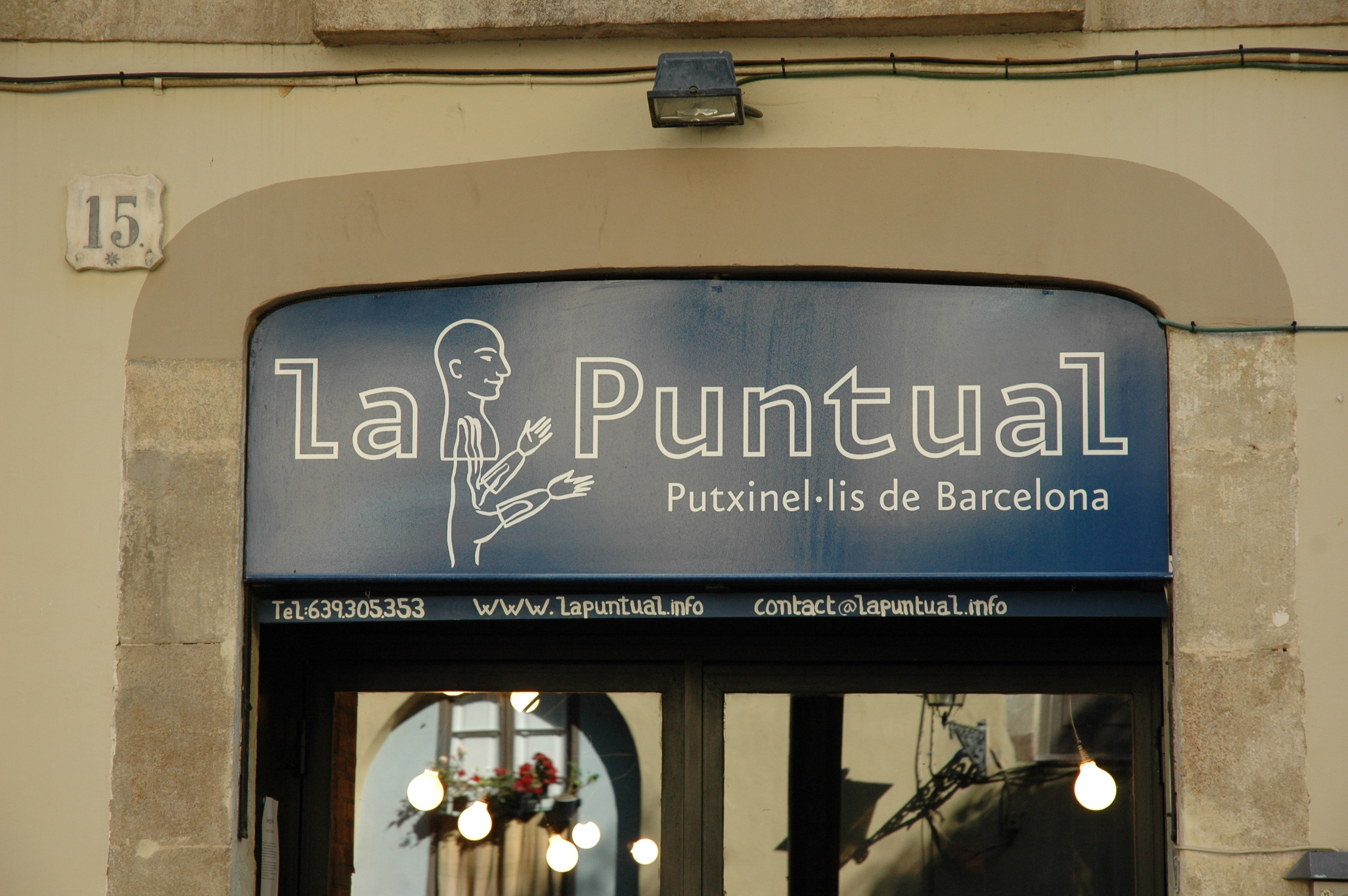 La Puntual, Carrer d'Allada Vermell, 15, Barcelona